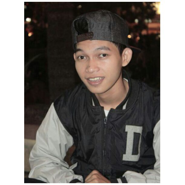 Ade Wahyu Tysna